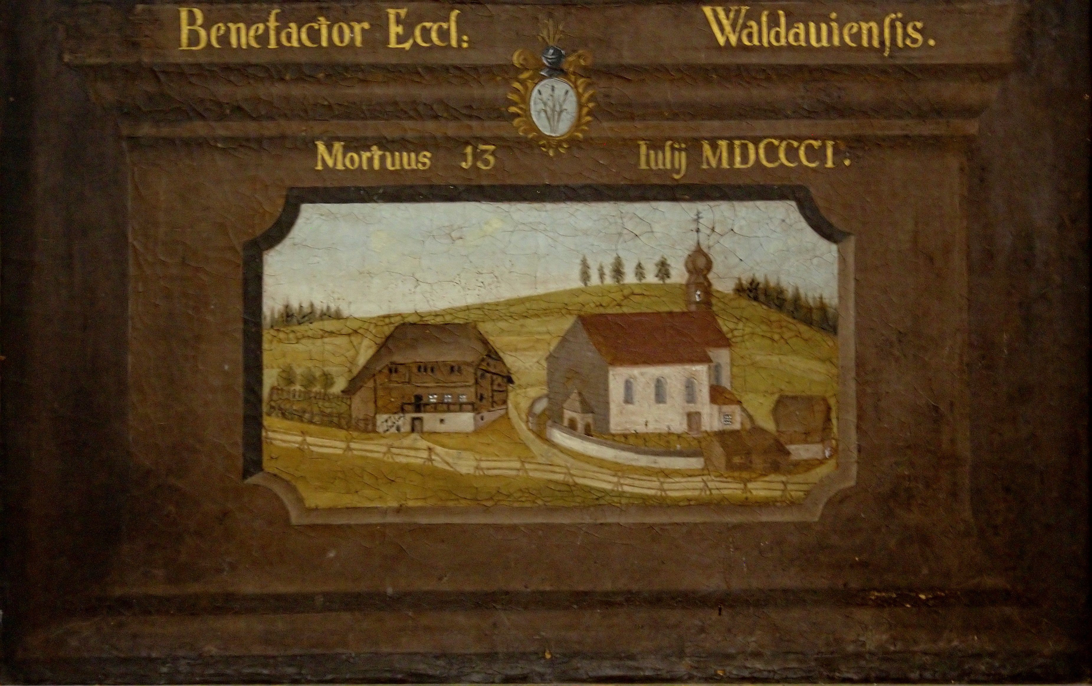 Die Pfarrkirche St.Nikolaus in Waldau Die Ortschaft Waldau gehört zu Titisee-Neustadt